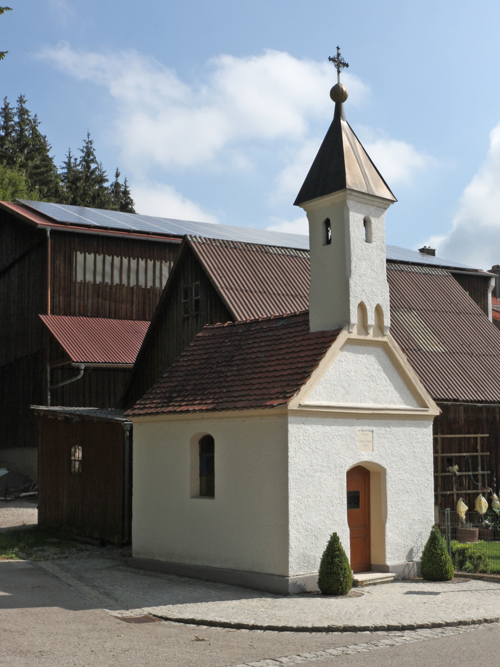 Nordwestansicht